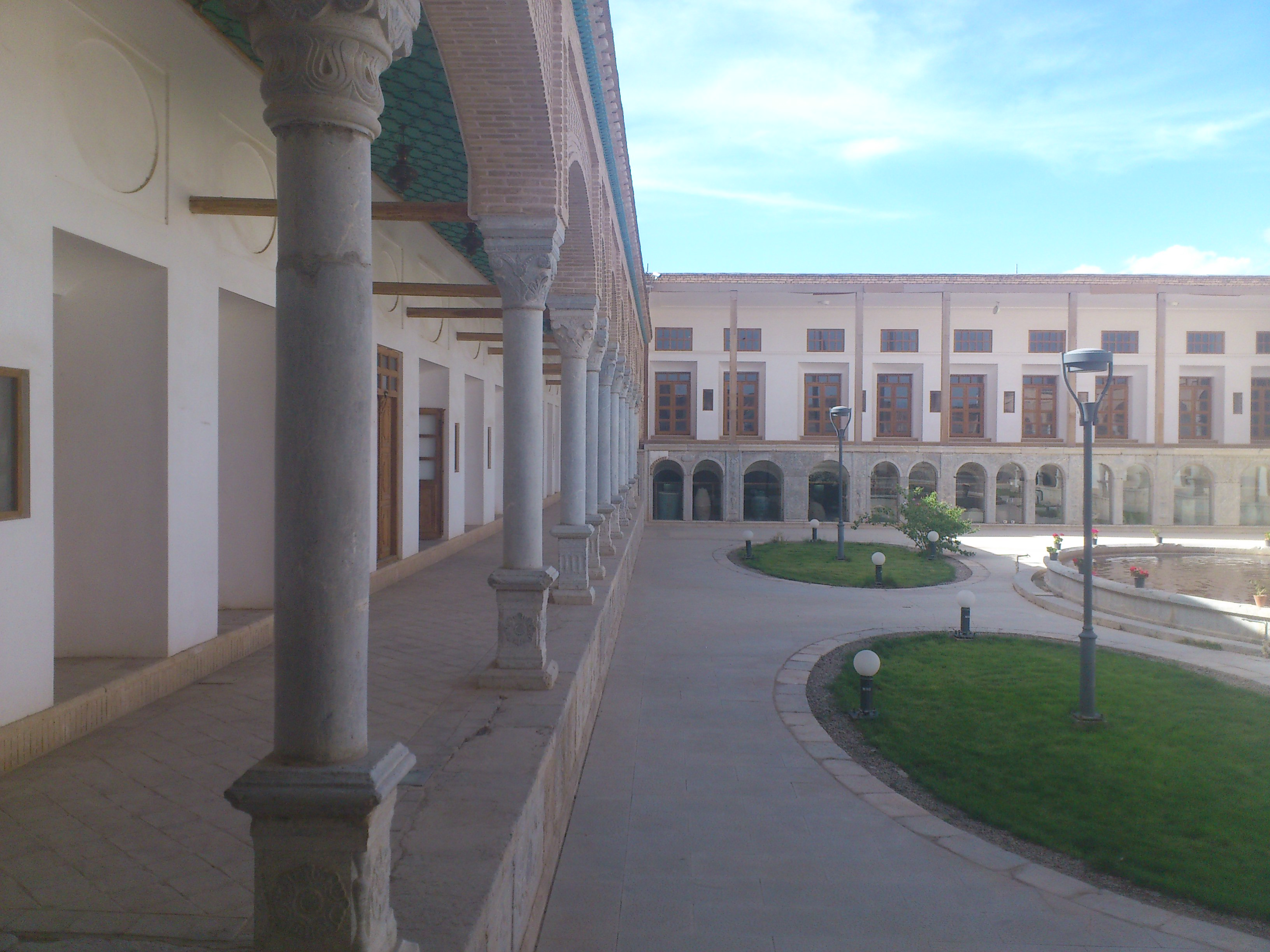 این قسمت نود درصد تخریب شده بود که کانلا بازسازی شده